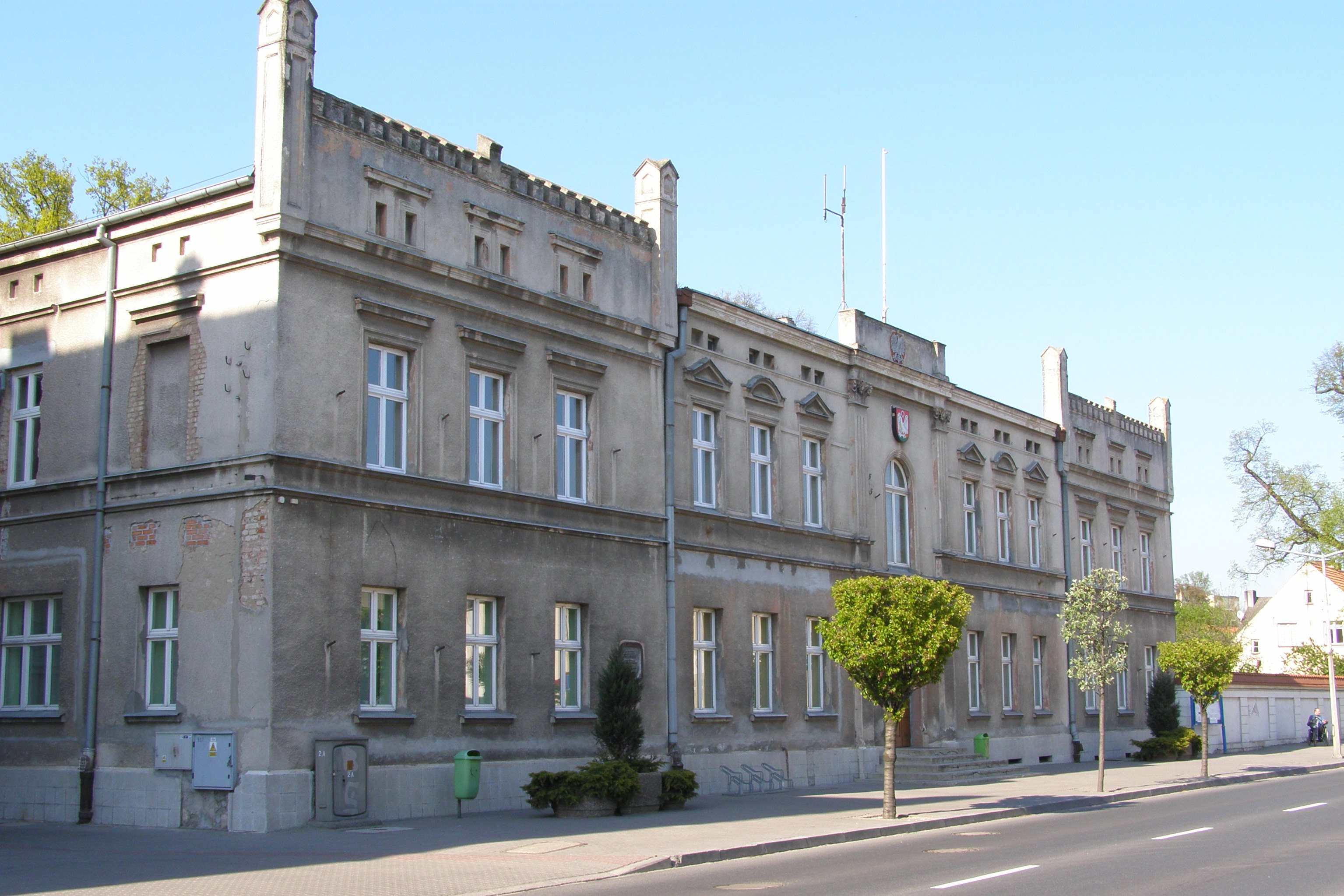 Urząd Miasta i Gminy w Szubinie